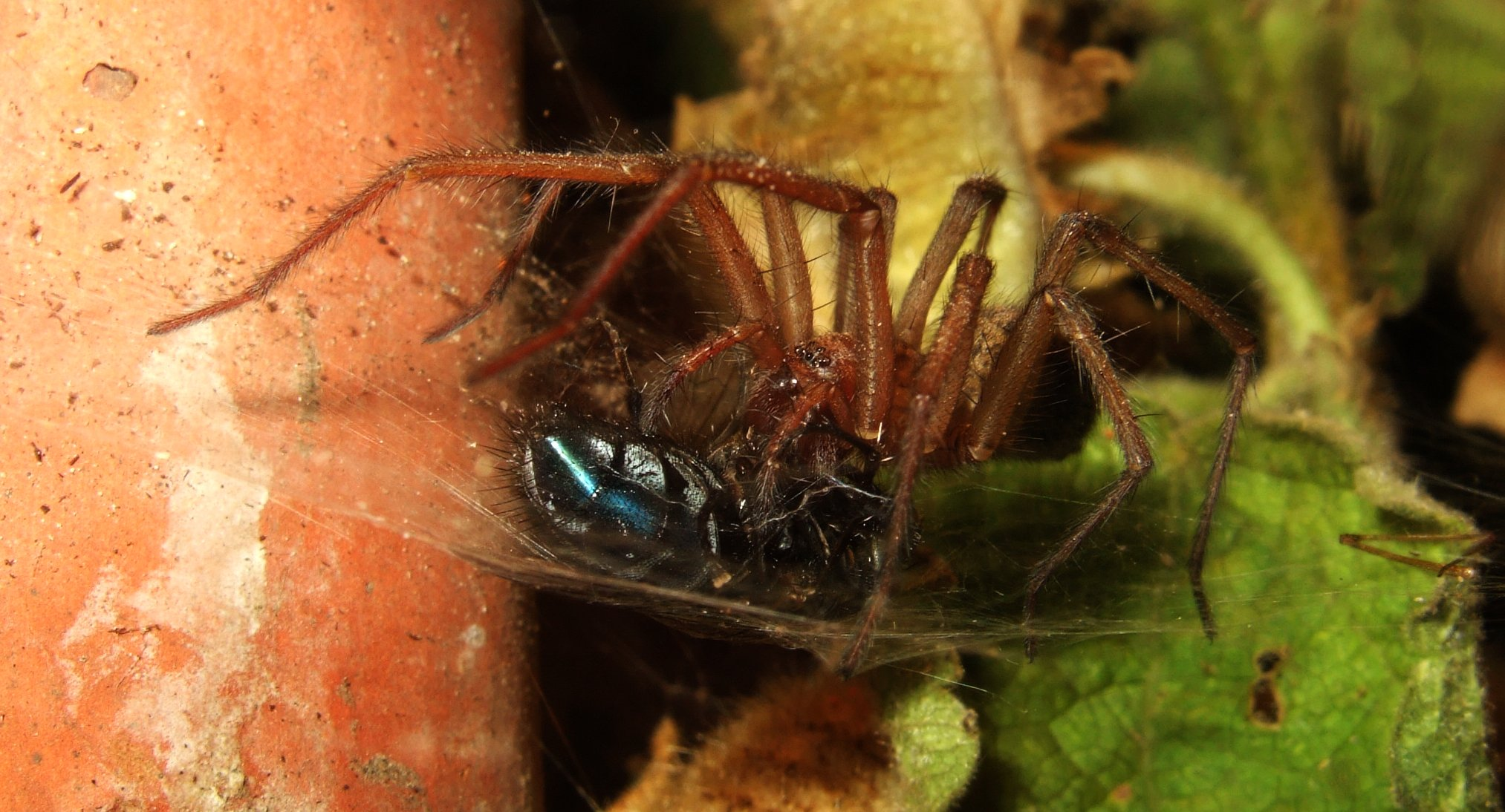 Hauswinkelspinne beim töten